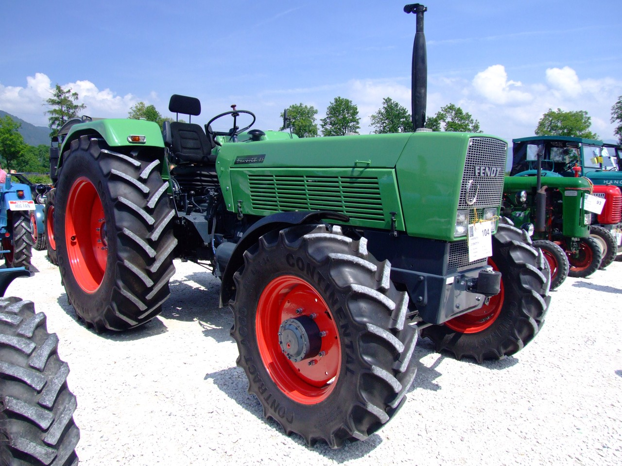 Fendt Favorit 4S mit 95 PS, Baujahr 1967